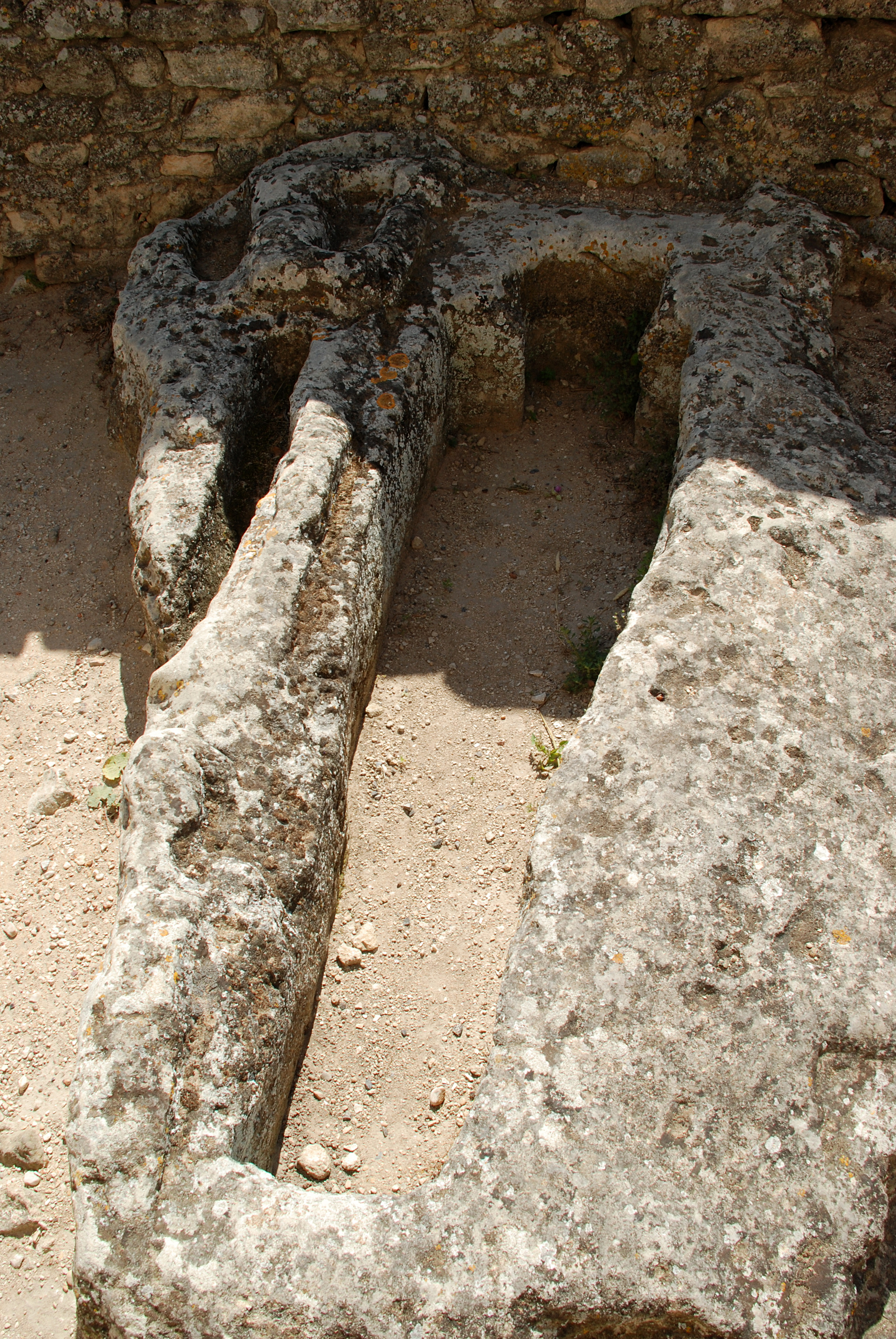 France - Provence - Vaucluse - Luberon - Église de Saint-Pantaléon